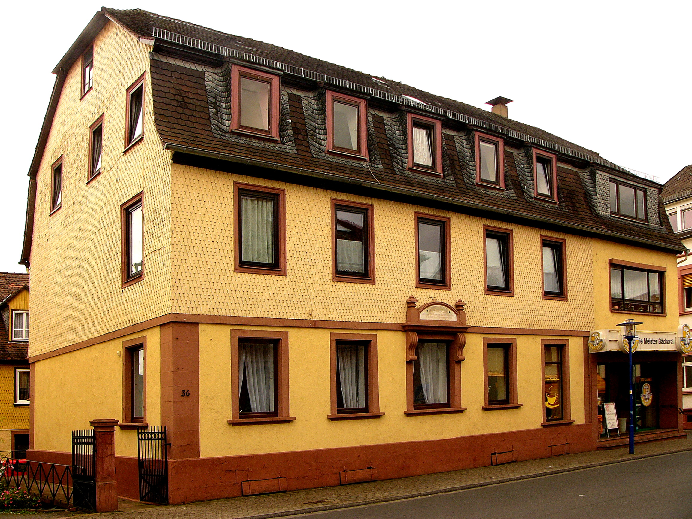 Zweieinhalbstöckiges, verschindeltes Fachwerkhaus in Traufstellung mit massivem Erdgeschoß sowie Mansardgiebeldach mit Krüppelwalm, 1825 von einem Rotgerbermeister erbaut. Stattliches Gebäude, beeinträchtigt durch die Umwandlung des Mittelportals in ein Fenster und die Verlängerung um eine Achse. Geburtshaus von Alfred Maul, dem Förderer der deutschen Turnbewegung. Originale Toreinfahrt.